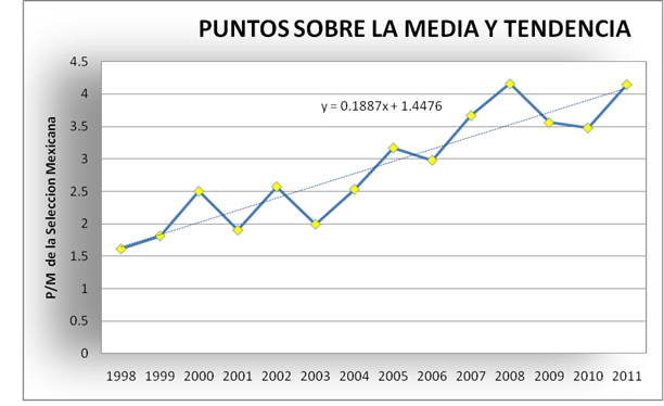 Gráfica de Puntos sobre la media de los competidores mexicanos en las IOI hasta el 2011